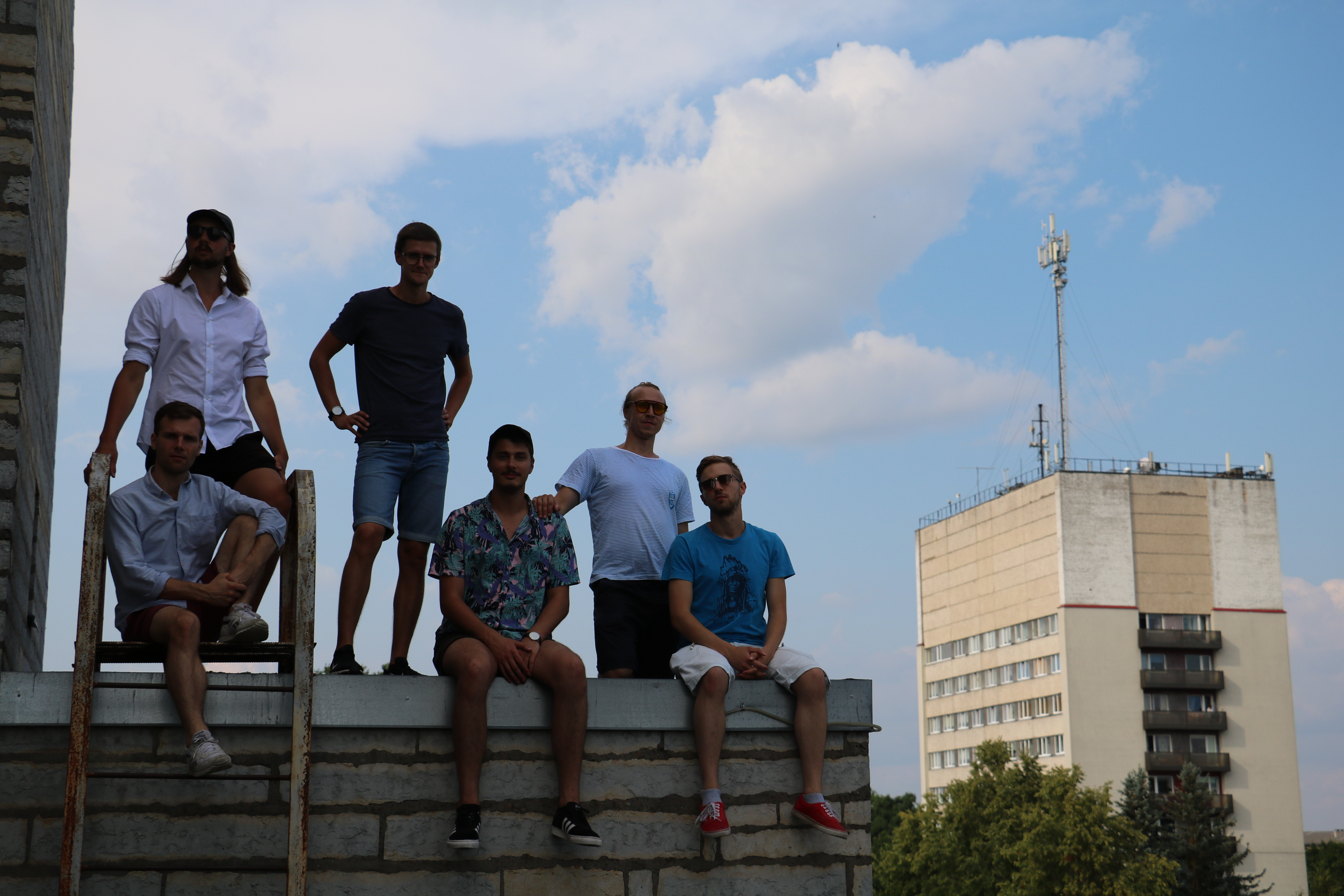 Paide Teatri kuueliikmeline trupp 1. augustil 2018.